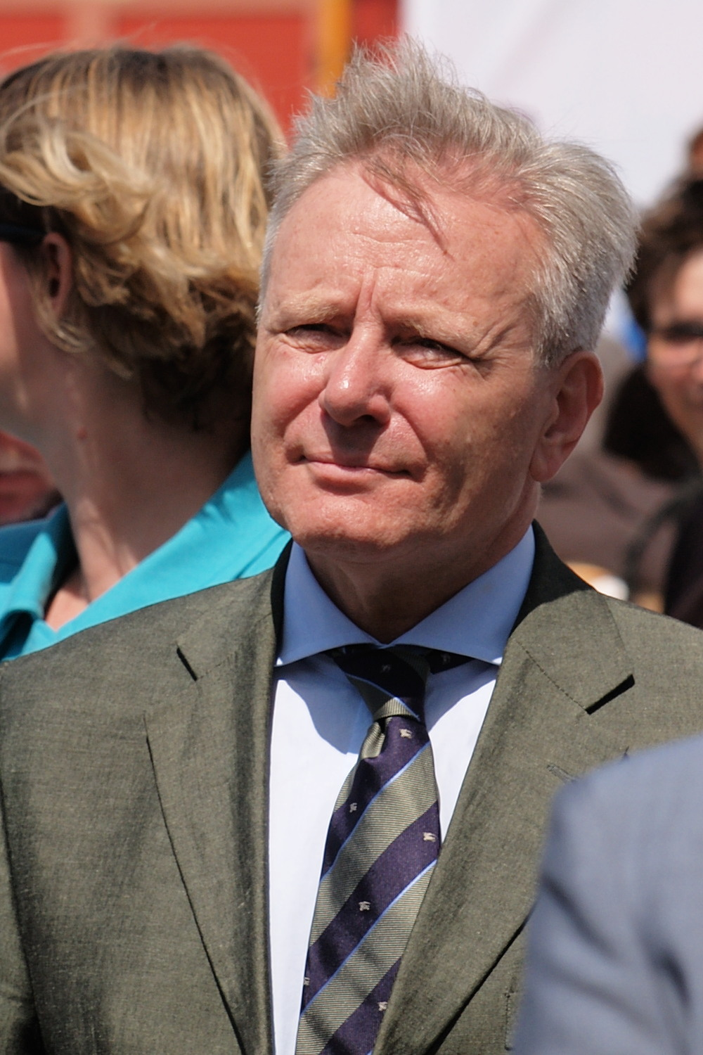 Horst Schiereck, Oberbürgermeister in Herne, bei Eröffnung der Emscherkunst 2010 in Herne